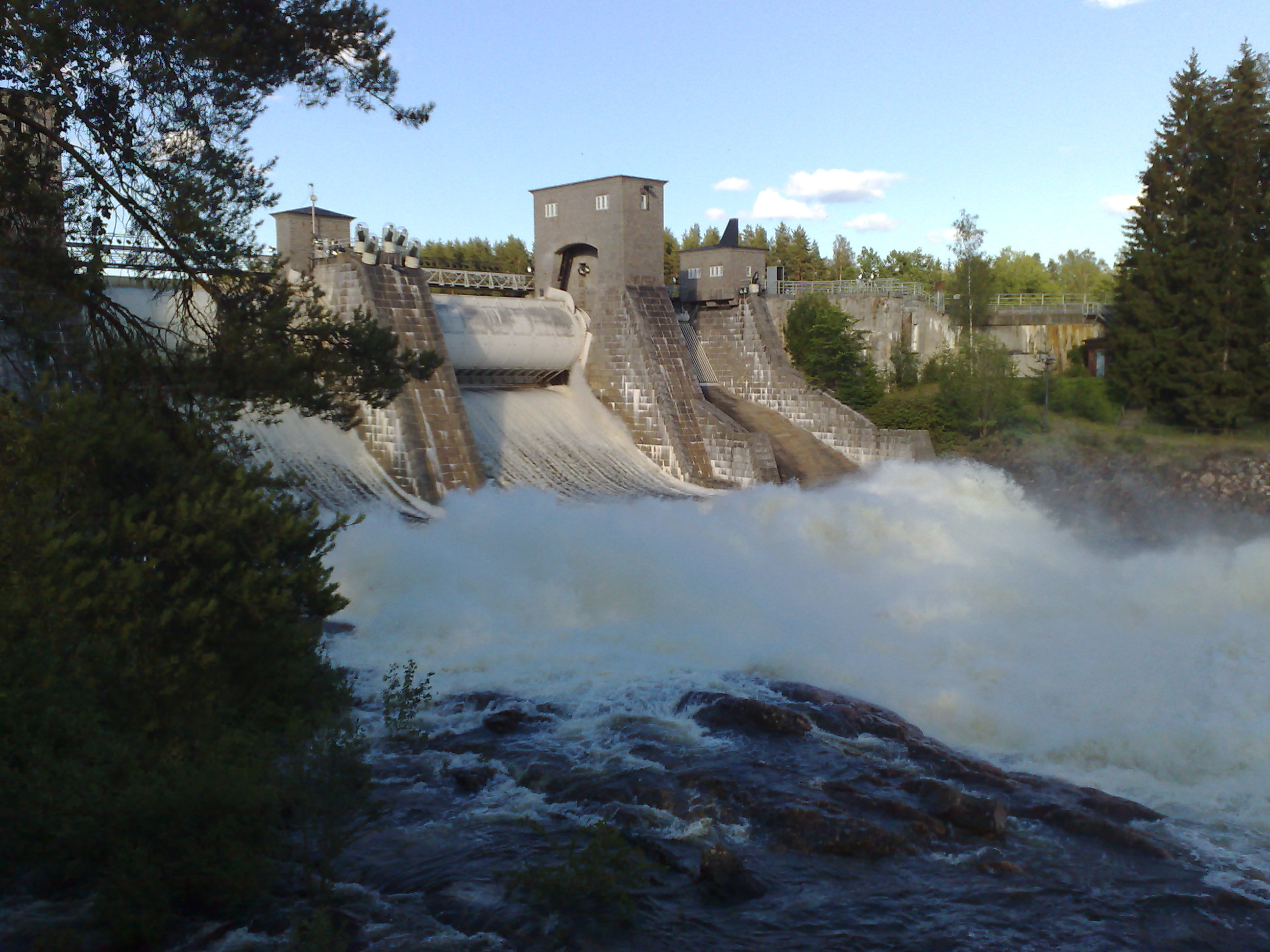 Imatra